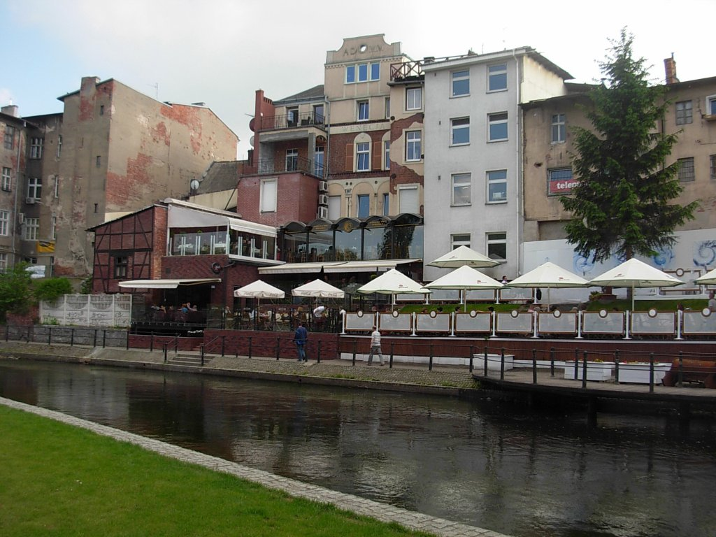 Wenecja Bydgoska